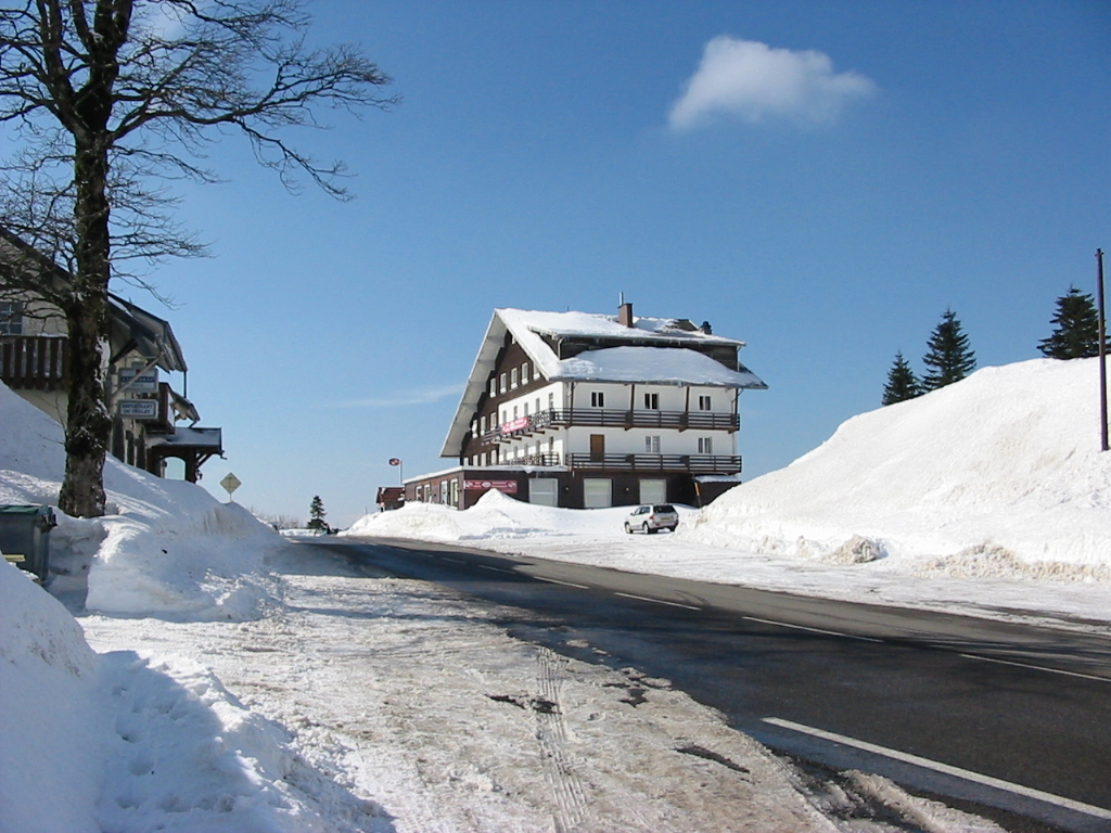 Le col de la Schlucht, dans le massif des Vosges, à la fin de l'hiver. Vue prise en venant d'Alsace.